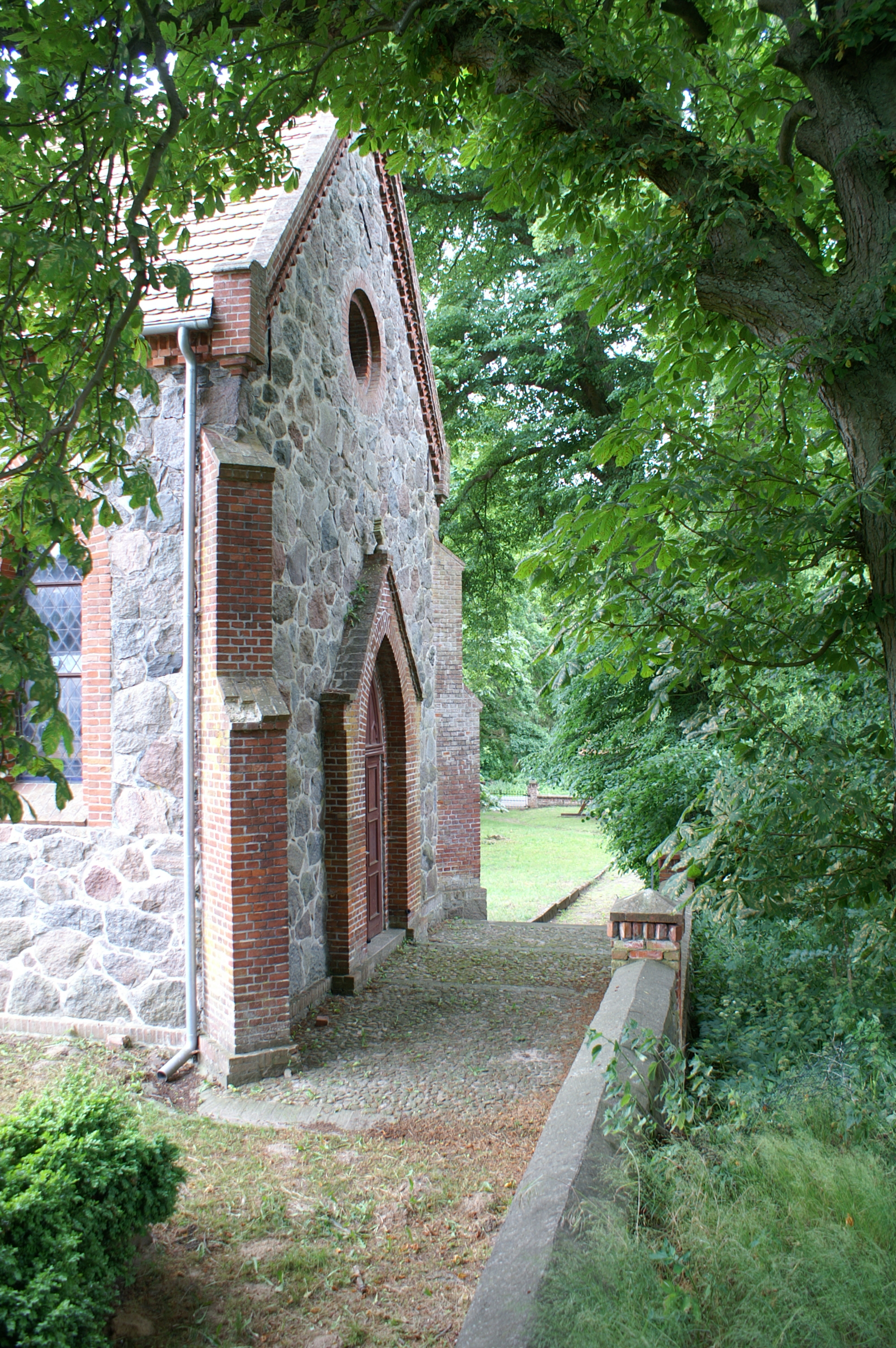 Kirche in Roidin, Westgiebel, Ansicht von Nordwesten